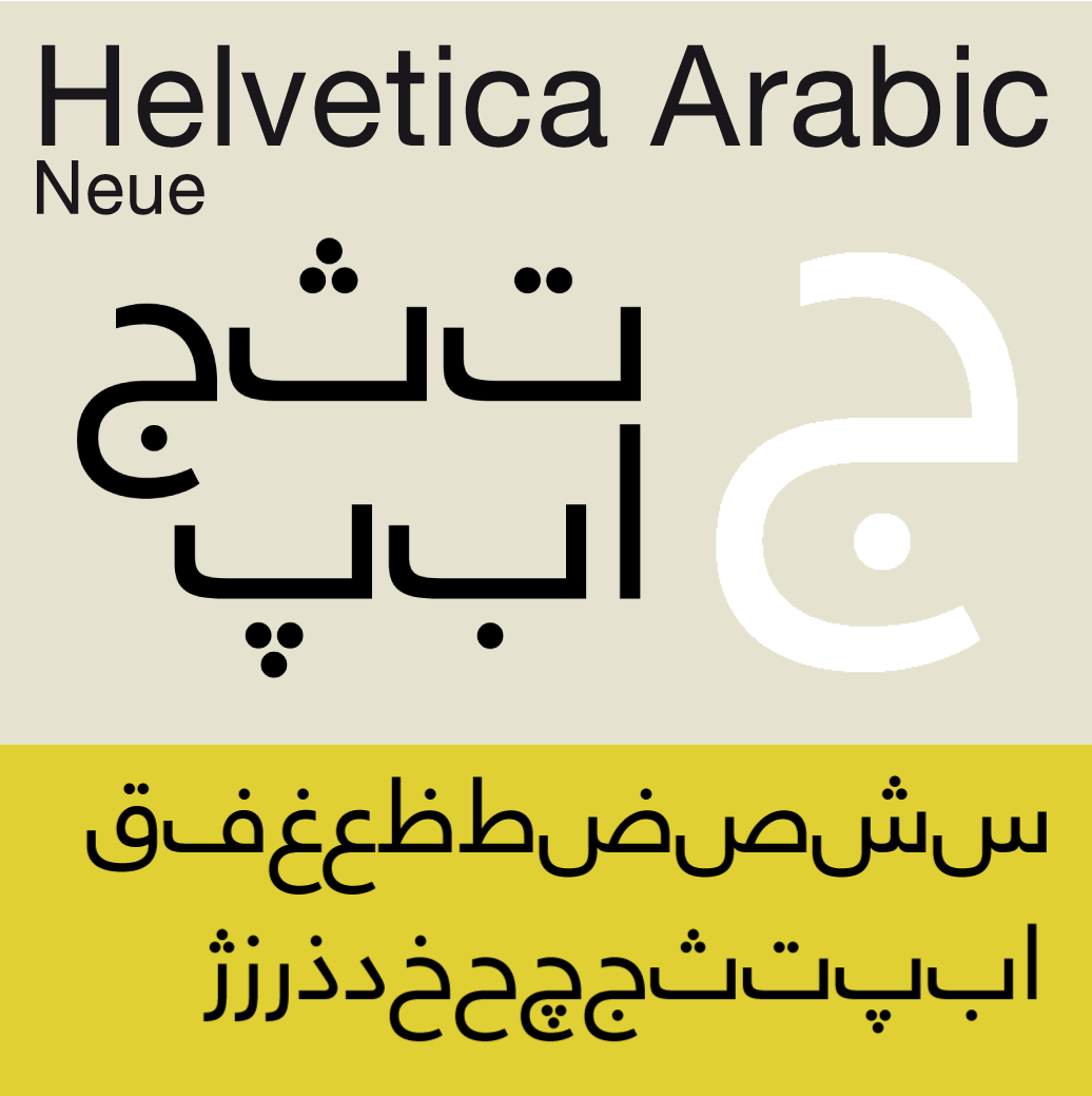 Helvetica Arabic, mostra tipogràfica